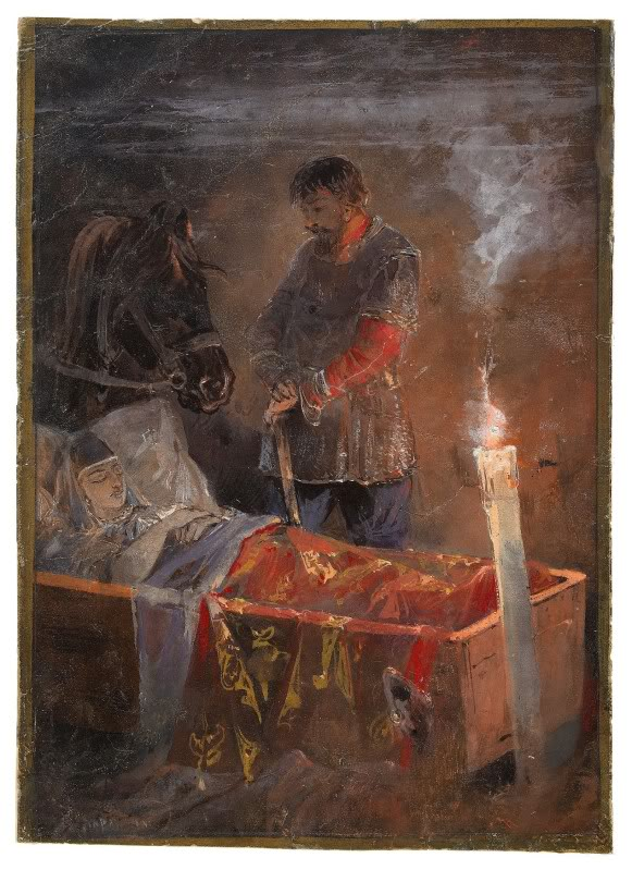 Спящая царевна